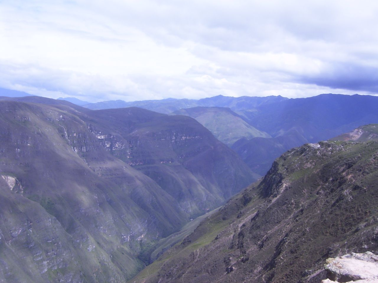 el Río Sonche cerca del pueblo Huancas, Provincia de Chachapoyas, Amazonas, Peru.